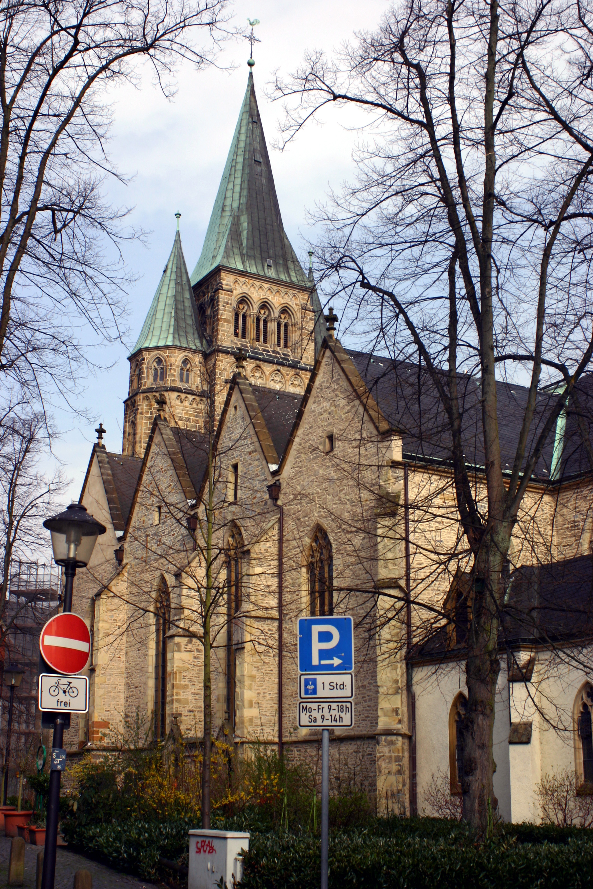 Kirche Sankt Laurentius in Warendorf